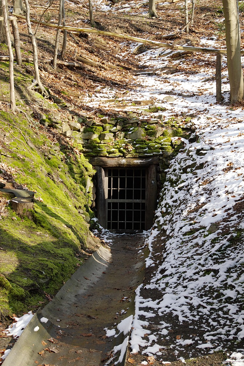 Eingang zum Stollen der stillgelegten Zeche Schleifmühle, Syburg, Dortmund